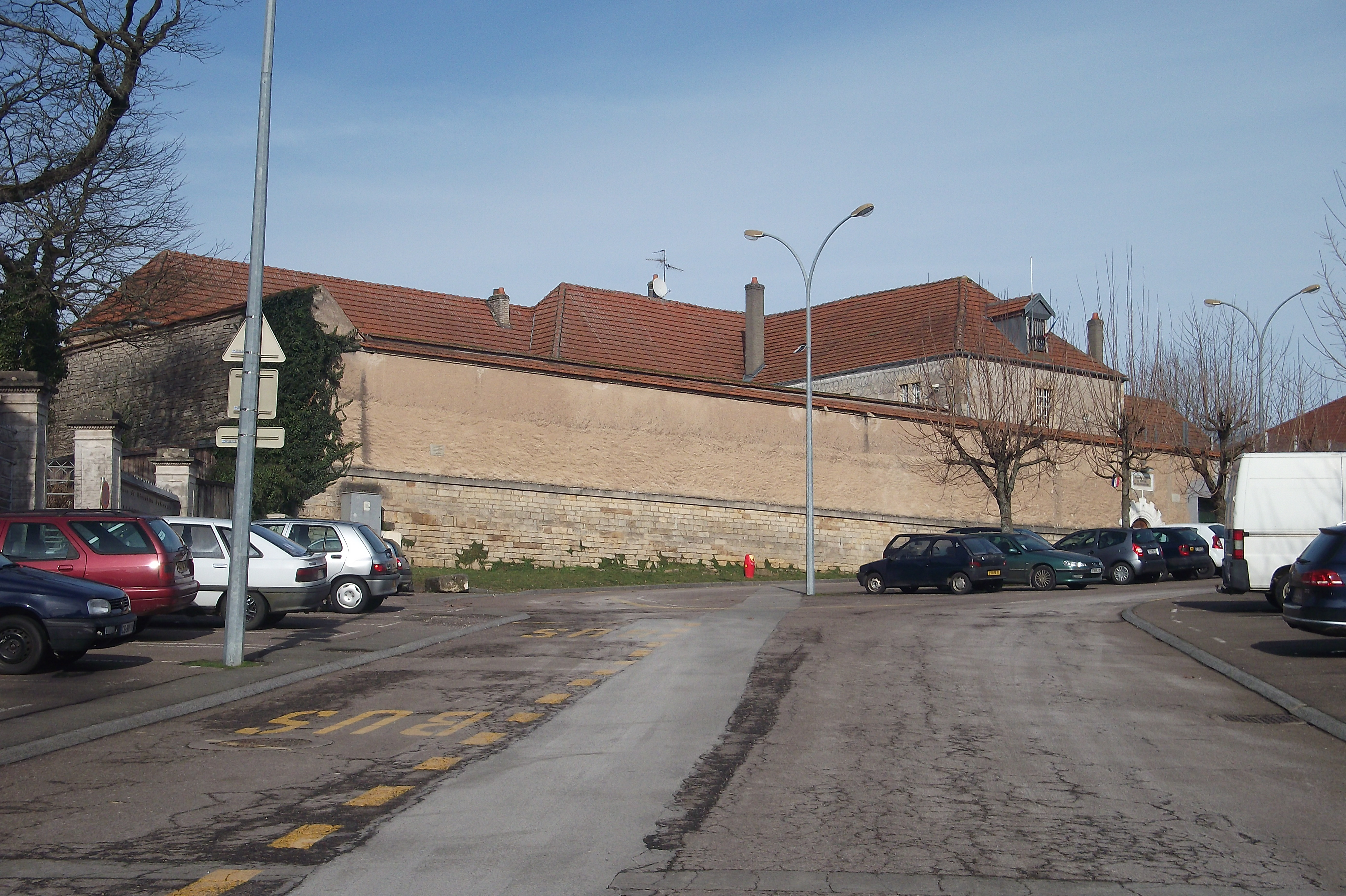 La Maison d'arrêt de Vesoul